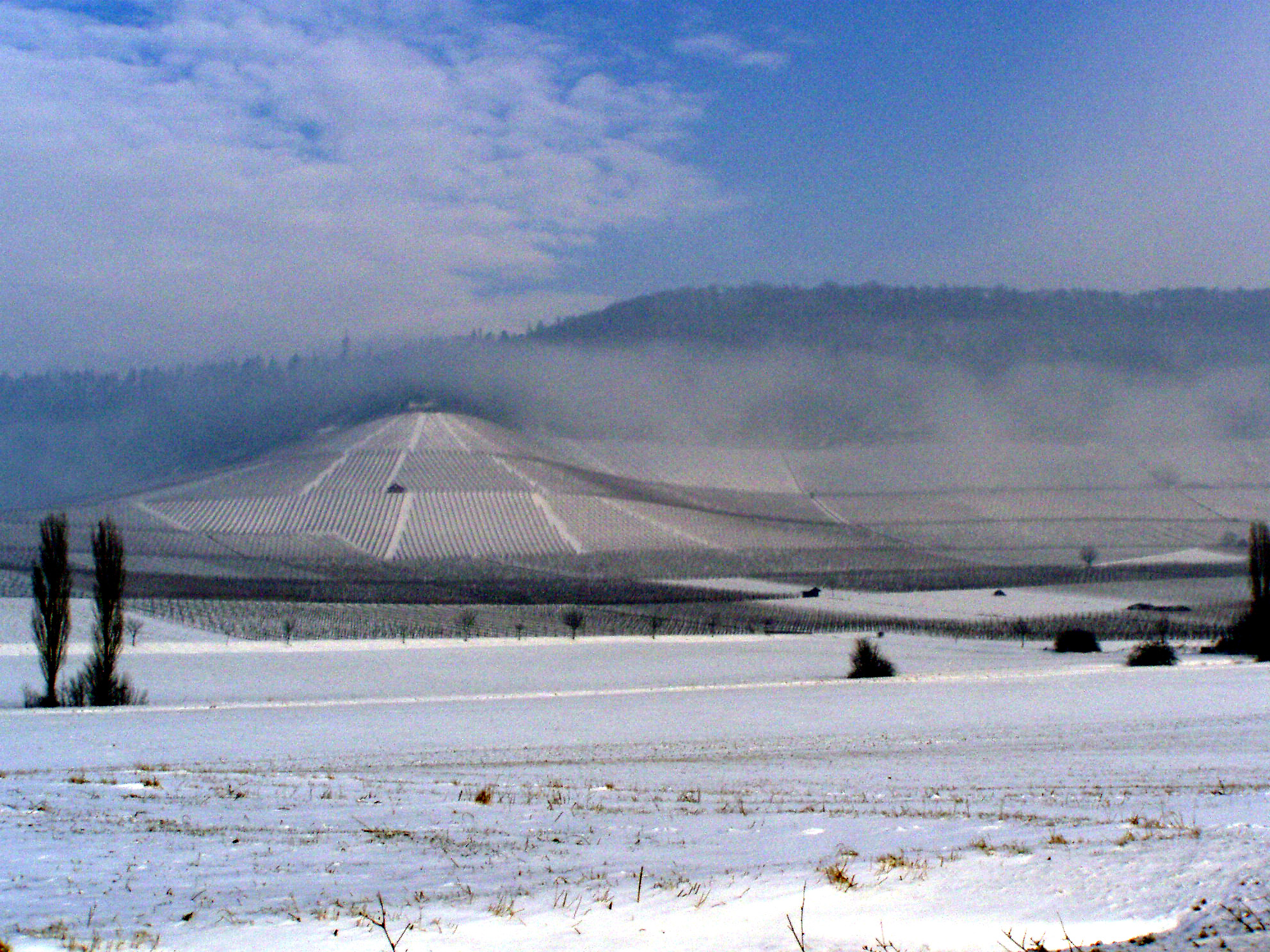 Der Schwanberg im Steigerwald mit Weingärten